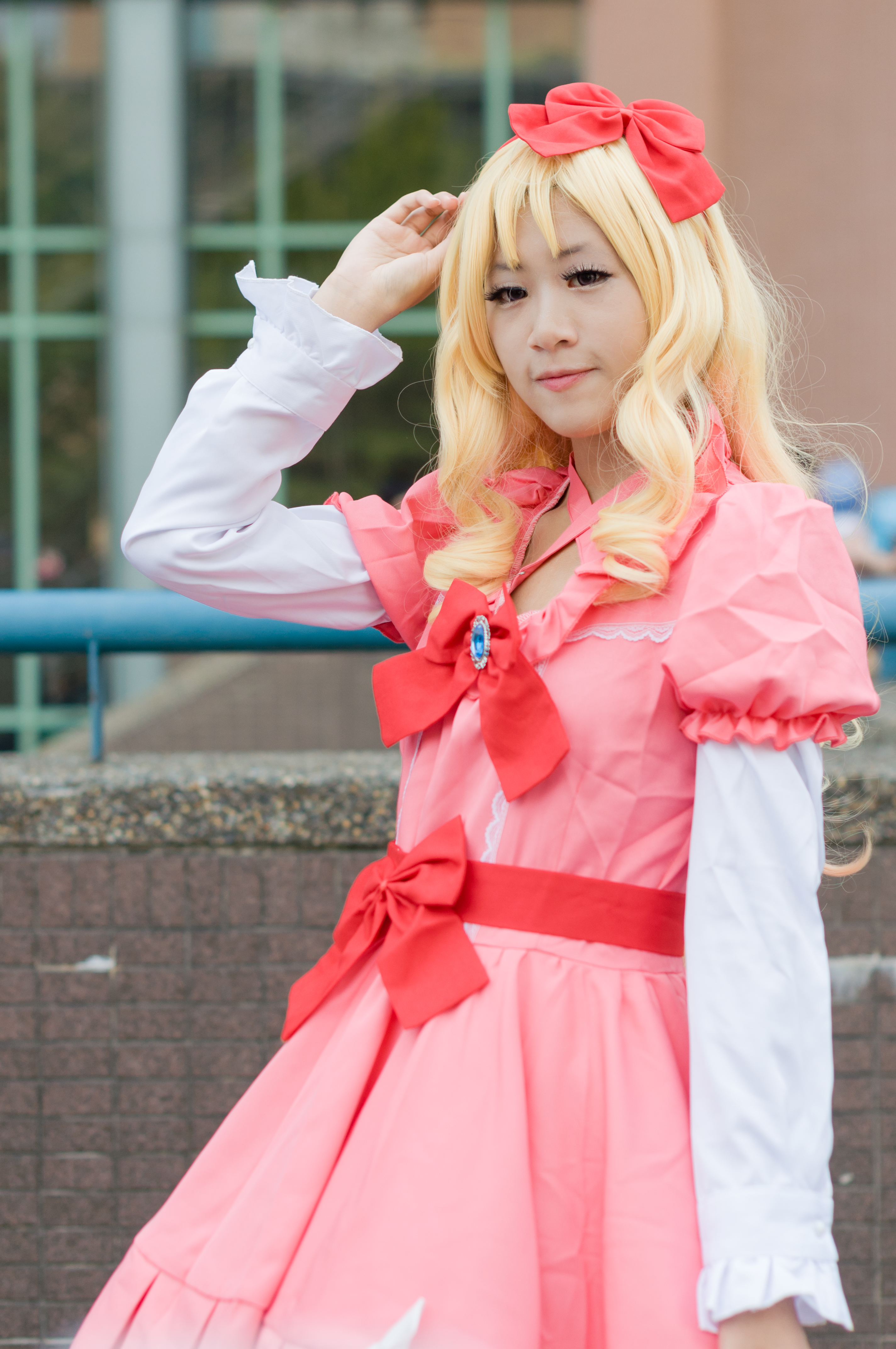 第46屆台灣同人誌販售會，《情色漫畫老師》山田妖精cosplayer。